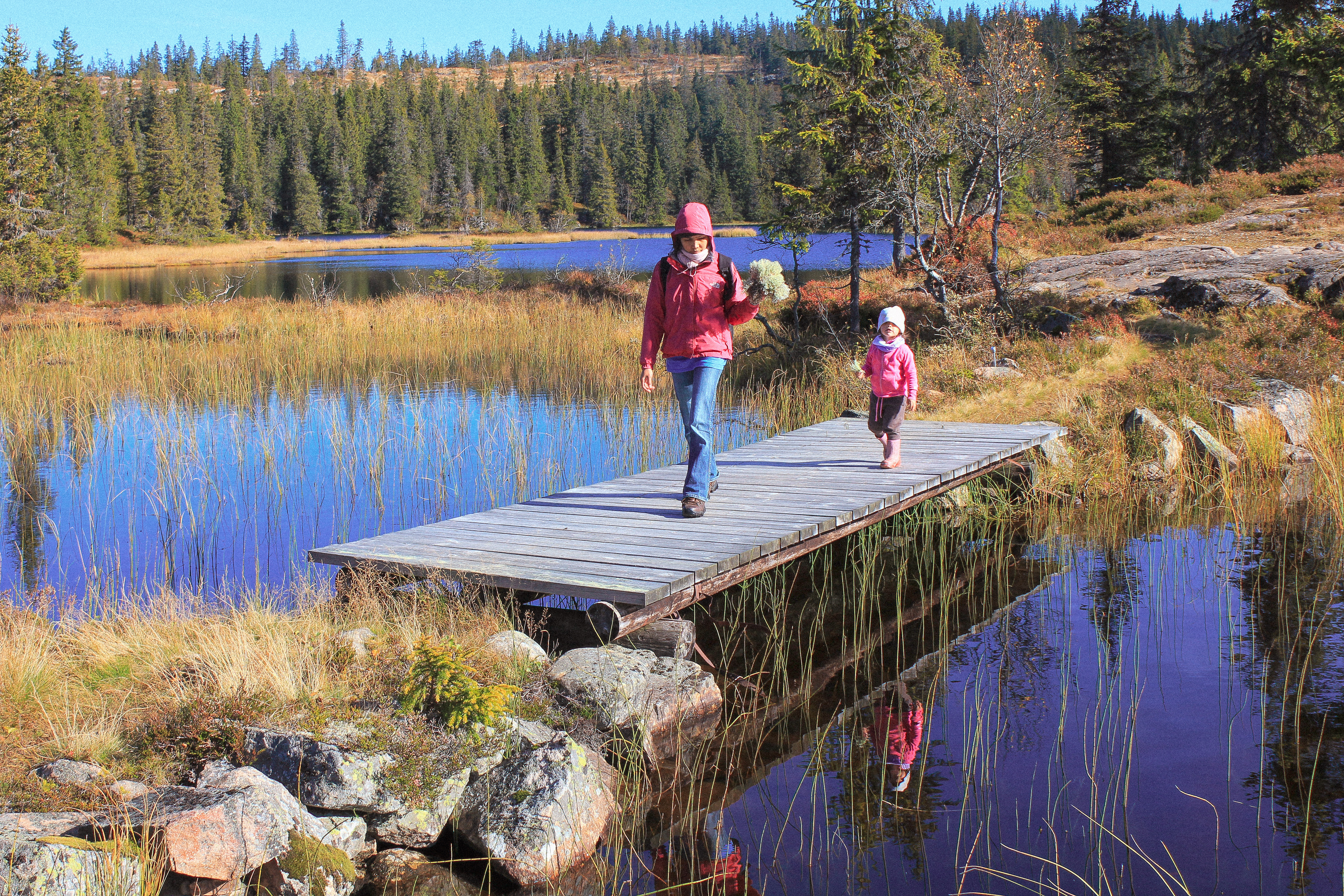 Fløytenbrua på Totenåsen, Østre Toten, mellom Vesle- og Store Fløyta.